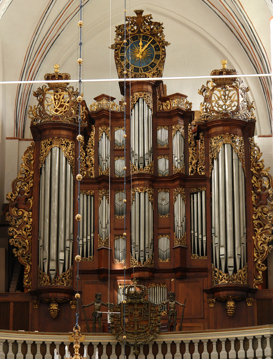 Dom zu Århus: Orgelfassade im Barockstil von Lambrecht Daniel Carsten (Carstens, Kastens), in den 1980er Jahren nach Entwürfen von Albrecht Schweitzer restauriert